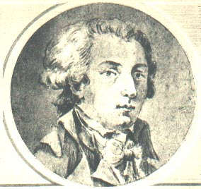 Marie-Joseph Chénier - lavis de Bonneville - Musée Lambinet